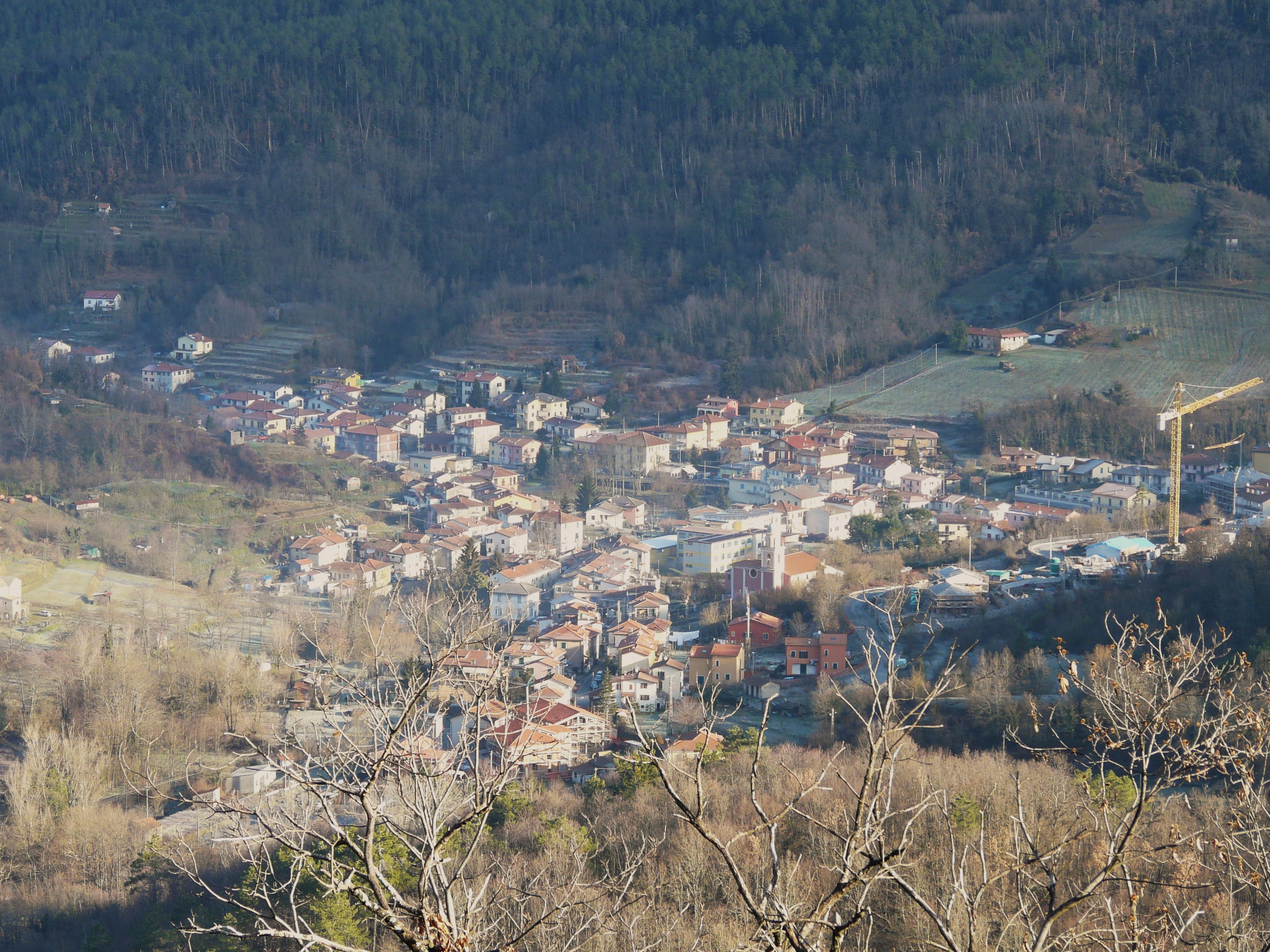 Riccò del Golfo di Spezia, Liguria, Italia